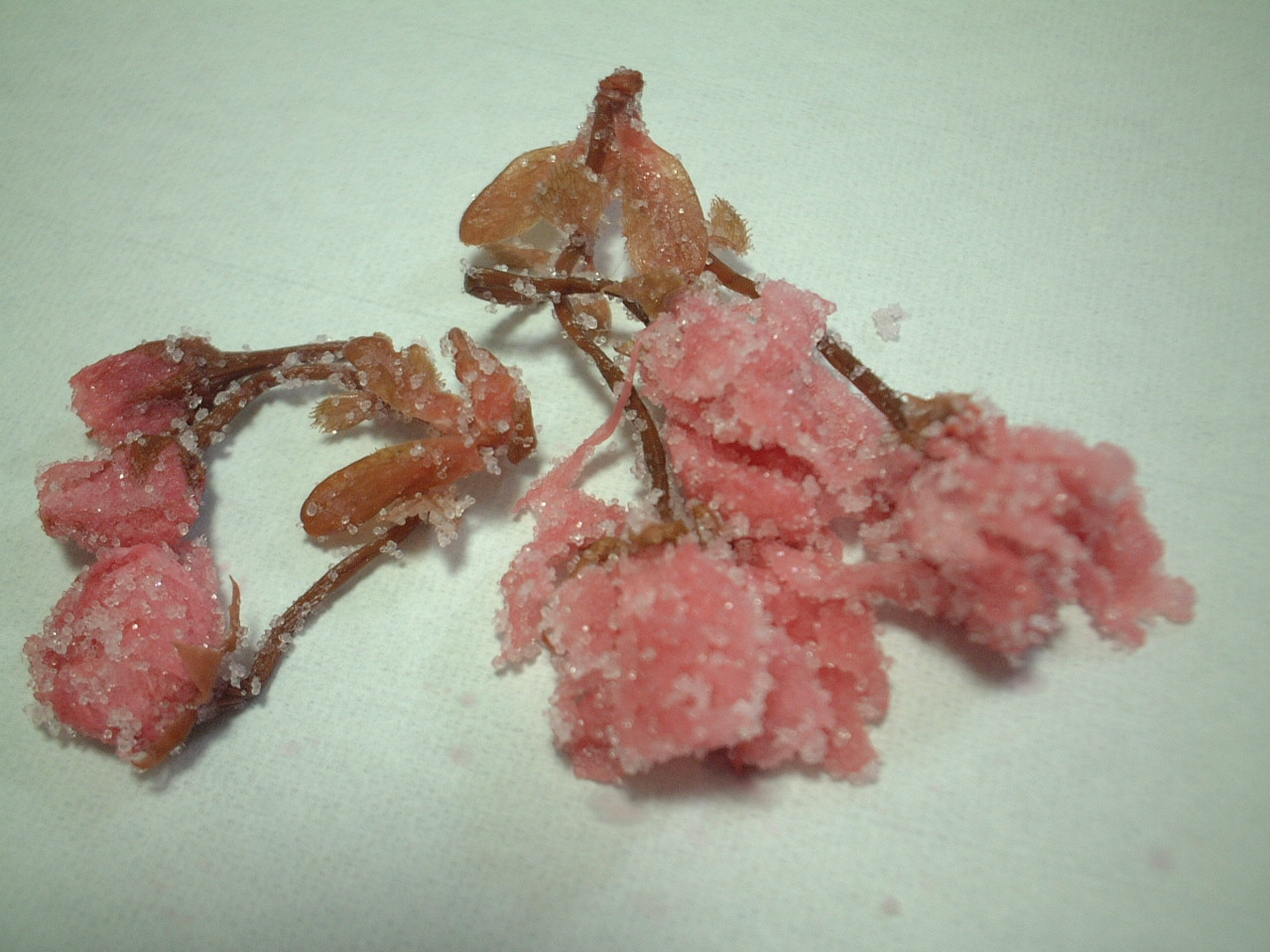 さくら湯。塩漬けの桜の花を、湯に入れて飲む。味を楽しむと言うよりも、季節感を味わう縁起物の性格が強い。Suguri Fによる撮影。湯に入れると広がり、Image:sakura_yu.jpgのようになる。 さくら湯